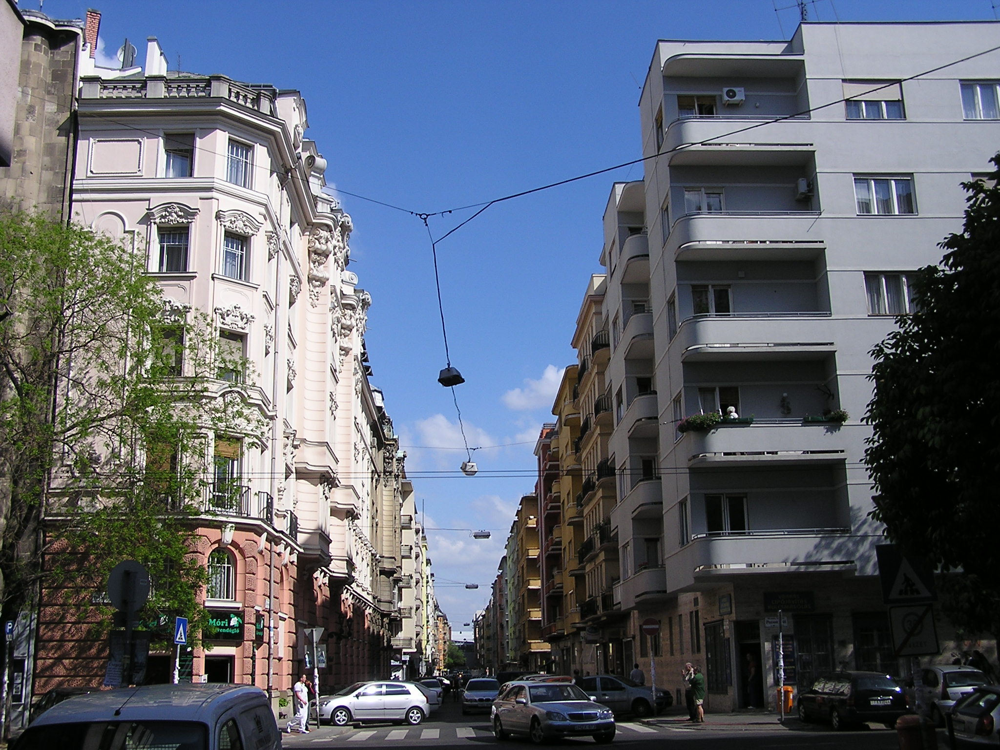 Az újlipótvárosi Balzac utca (Budapest)